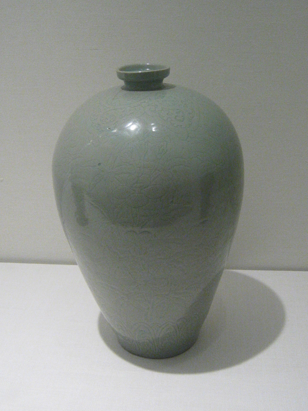 Goryeo celadon, Korea